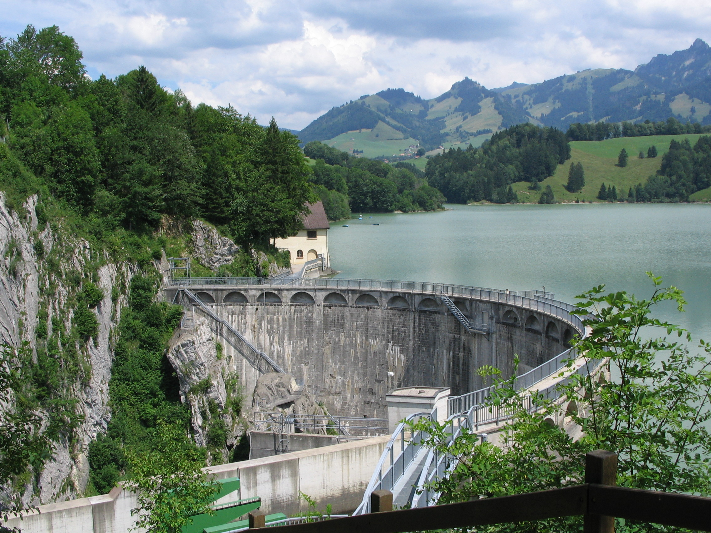 Le barrage de Montsalvens, construit en 1920 à proximité de Charmey, en Suisse, fut le premier barrage de type voûte à courbure horizontale et verticale en Europe.